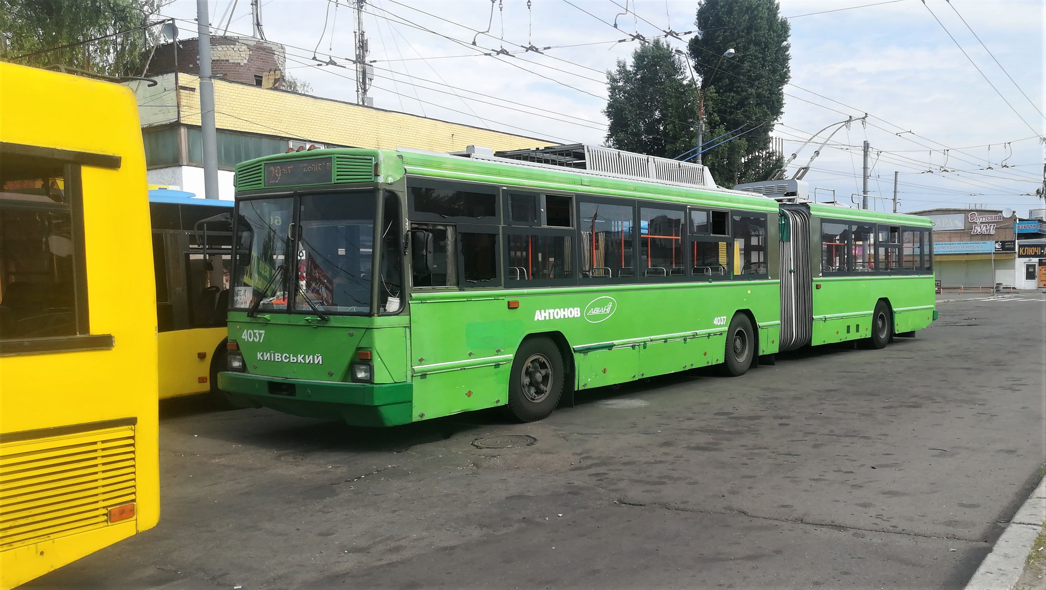 Тролейбус Київ-12.03 №4037 на кінцевій зупинці "ст. м. Почайна" в Києві (маршрут 29)